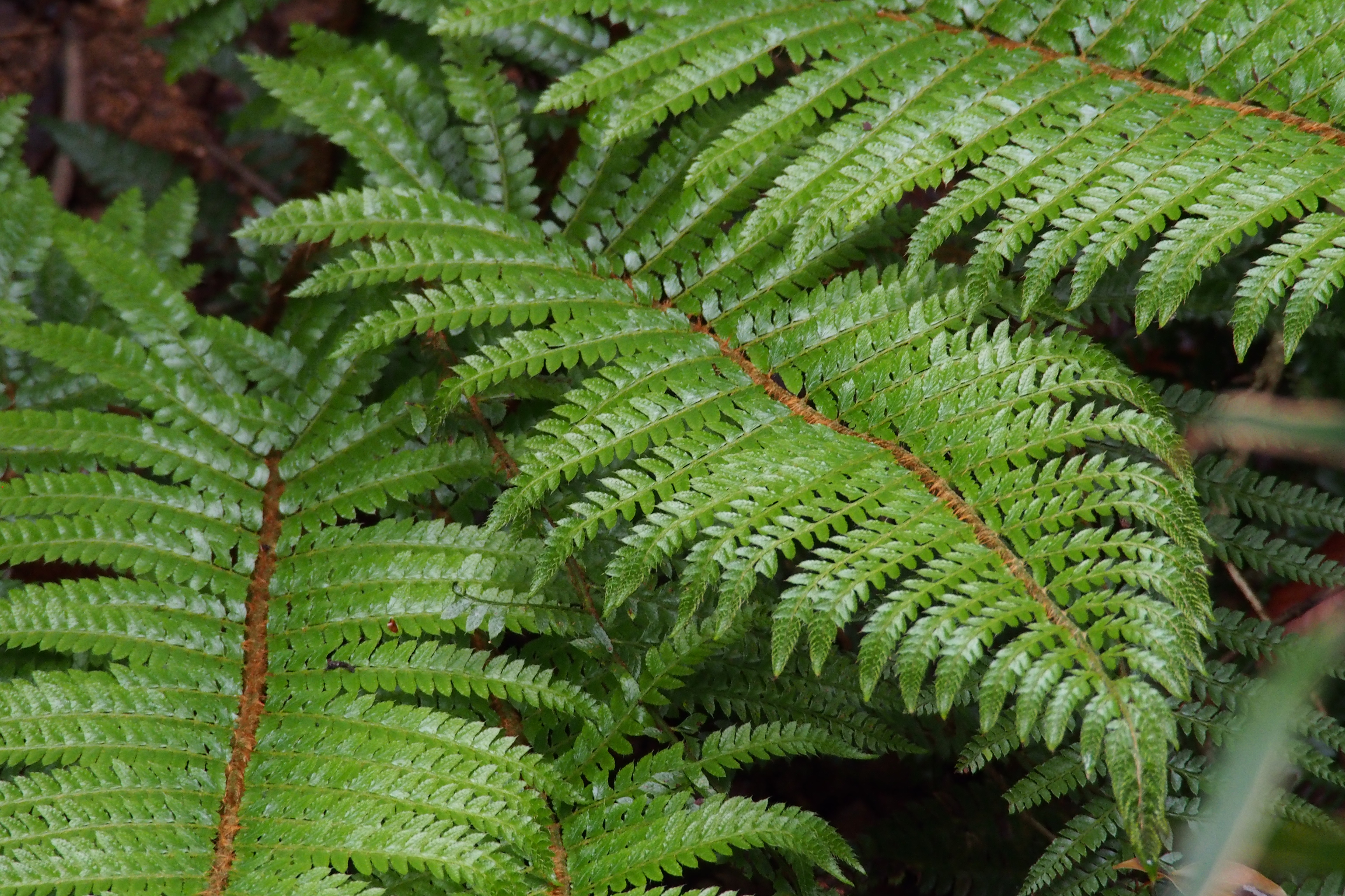 イノデ.